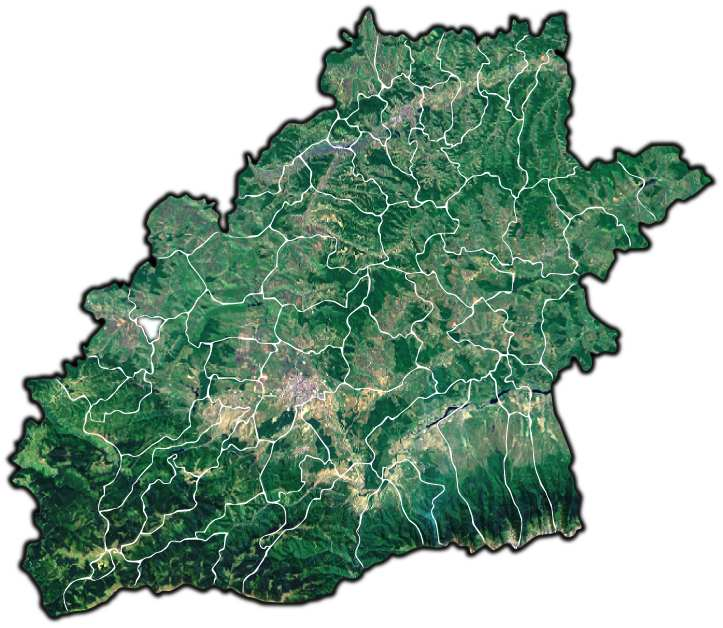 Apoldu de Jos jud Sibiu.